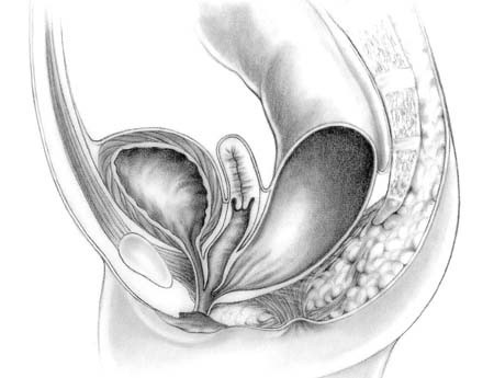 Persistent cloaca